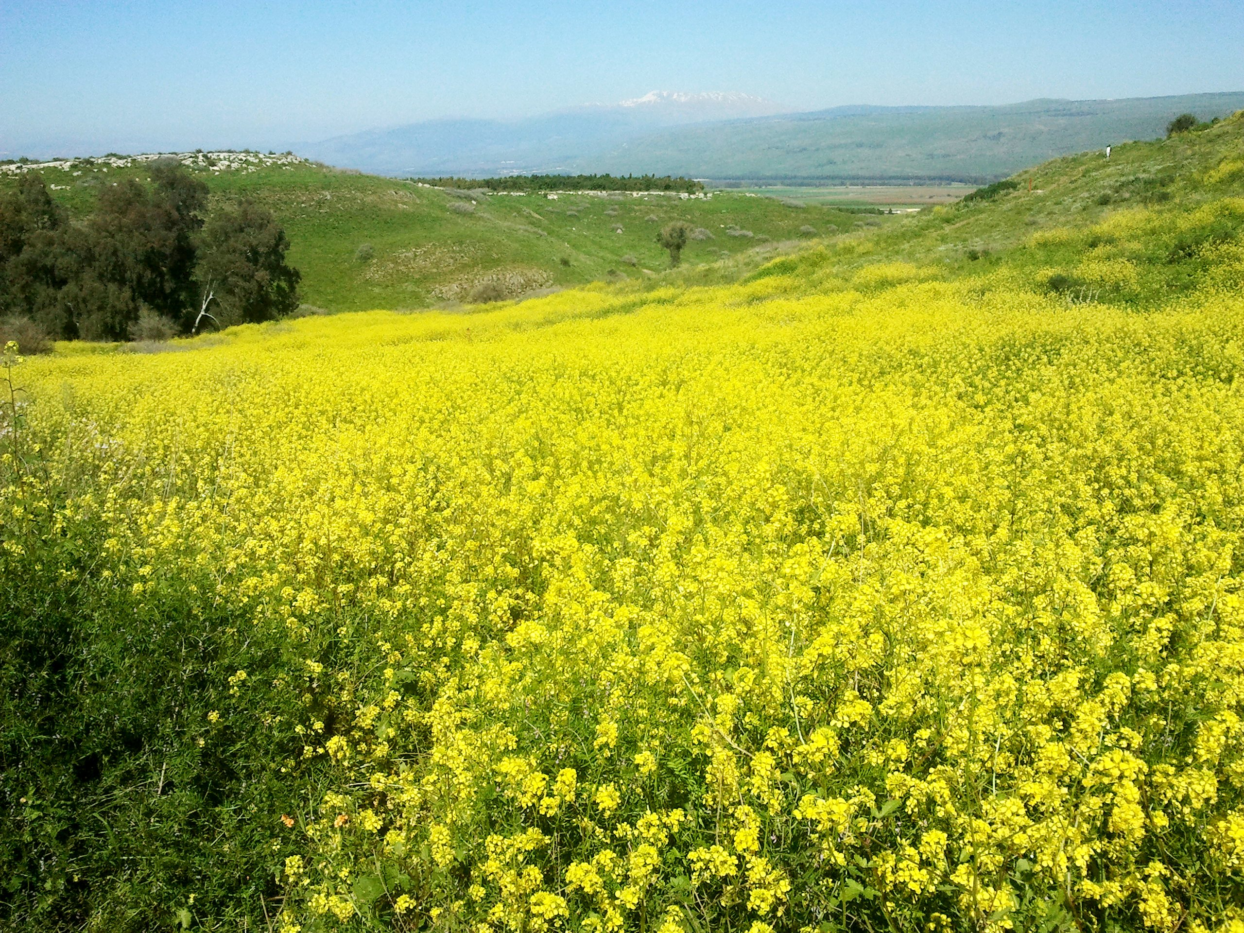 נחל מחניים זורם בגליל העליון, מהווה את גבולה הצפוני של רמת כורזים. בנחל נובע מעיין עין ירדה ליד חירבת ירדה. שדה של חרדל השדה